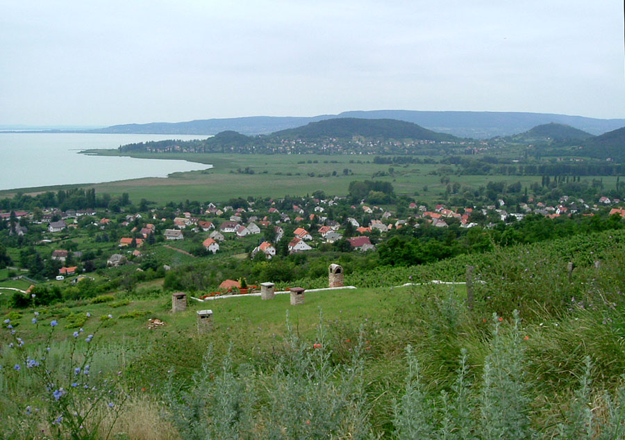 Balaton. Szigliget látványa Badacsonyból